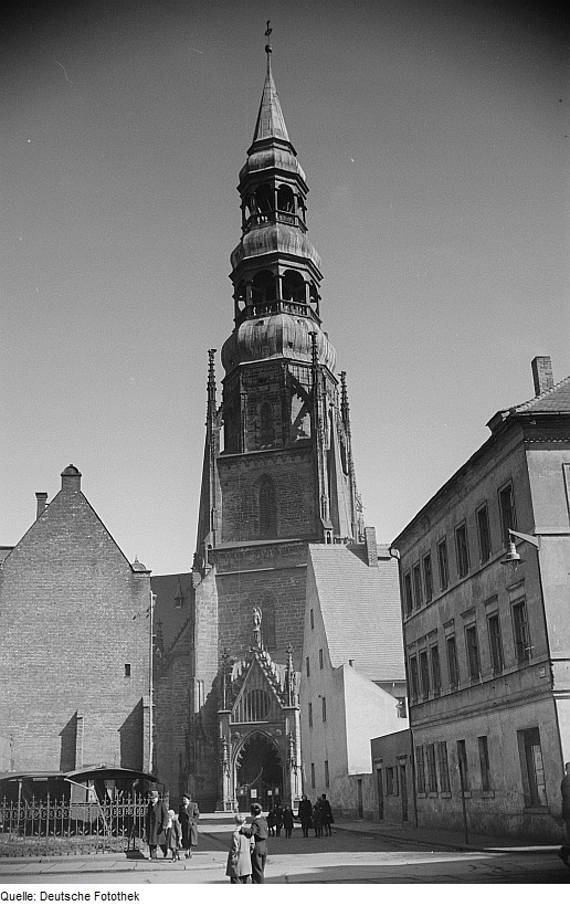 Original image description from the Deutsche FotothekAußenansicht des Domes St. Marien